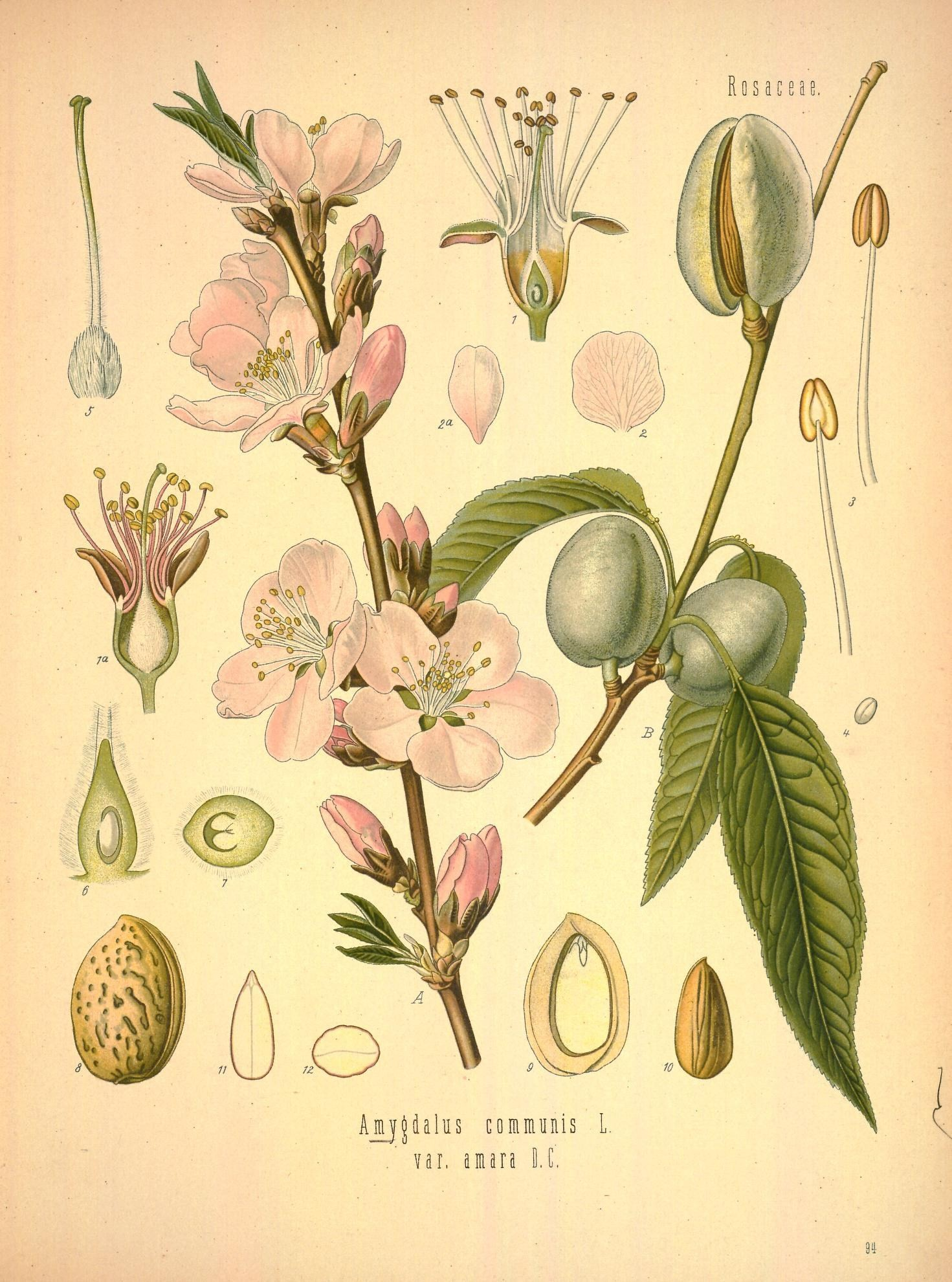 Mandelbaum. A B blühender und fruchtender Zweig, natürl. Grösse; 1 und 1a Blüthen von verschiedenen Bäumen, vergrössert (1a aus dem botanischen Garten in Jena); 2, 2a Kronblätter, natürl. Grösse; 3 Staubgefässe, desgl.; 4 Pollen, desgl.; 5 Stempel, desgl.; 6, 7 Fruchtknoten im Längs- und Querschnitt, desgl.; 8 Steinkern, desgl.; 9 derselbe im Längsschnitt, desgl.; 10 Mandel ohne Steinschale, desgl.; 11, 12 Same im Längs- und Querschnitt, desgl. Die abgebildete Mandel ist irrtümlicherweise als var. amara bezeichnet; es muss heissen var. dulces.